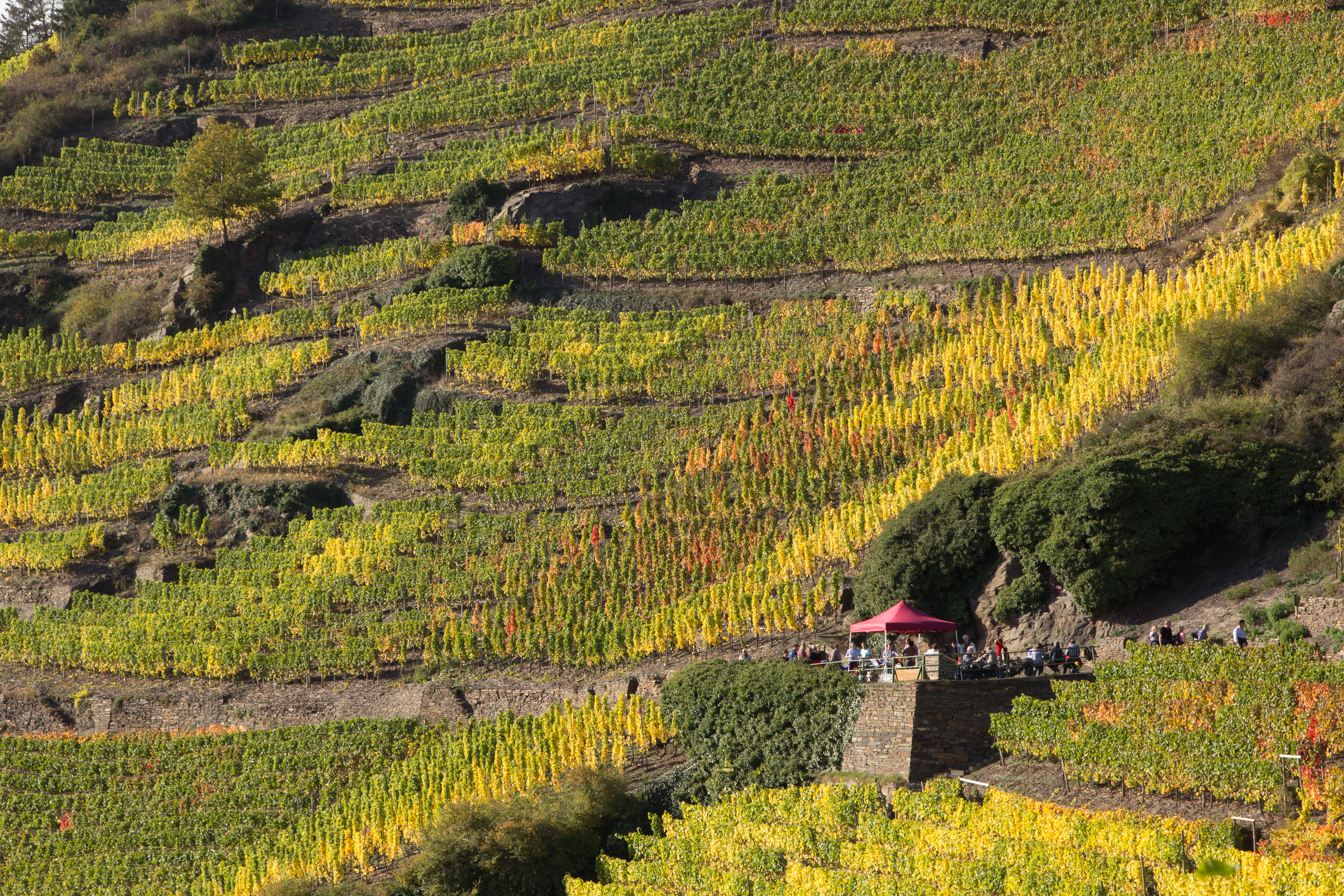 Rotweinwanderweg bei Mayschoß